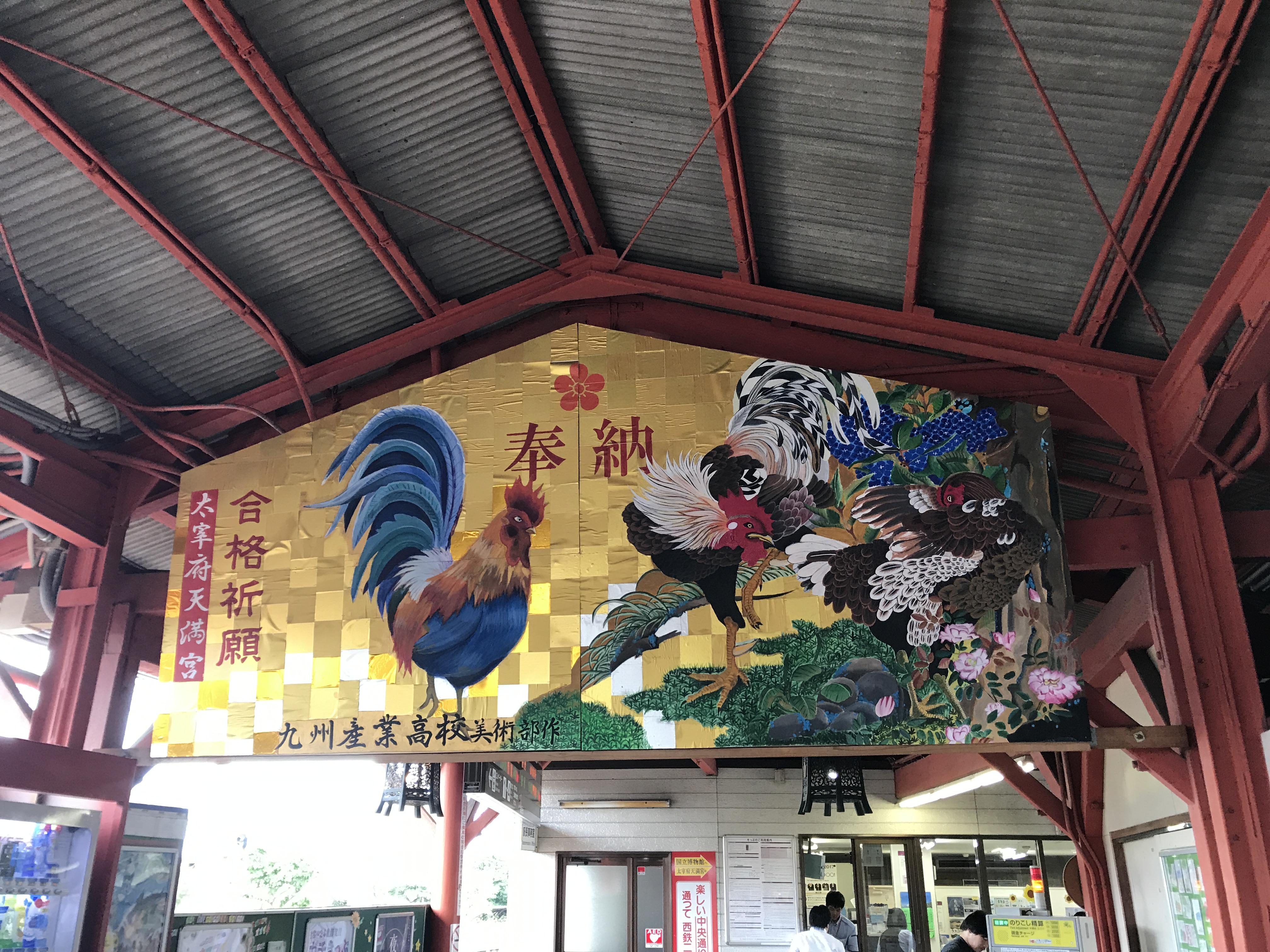 二日市駅構内・絵馬の装飾